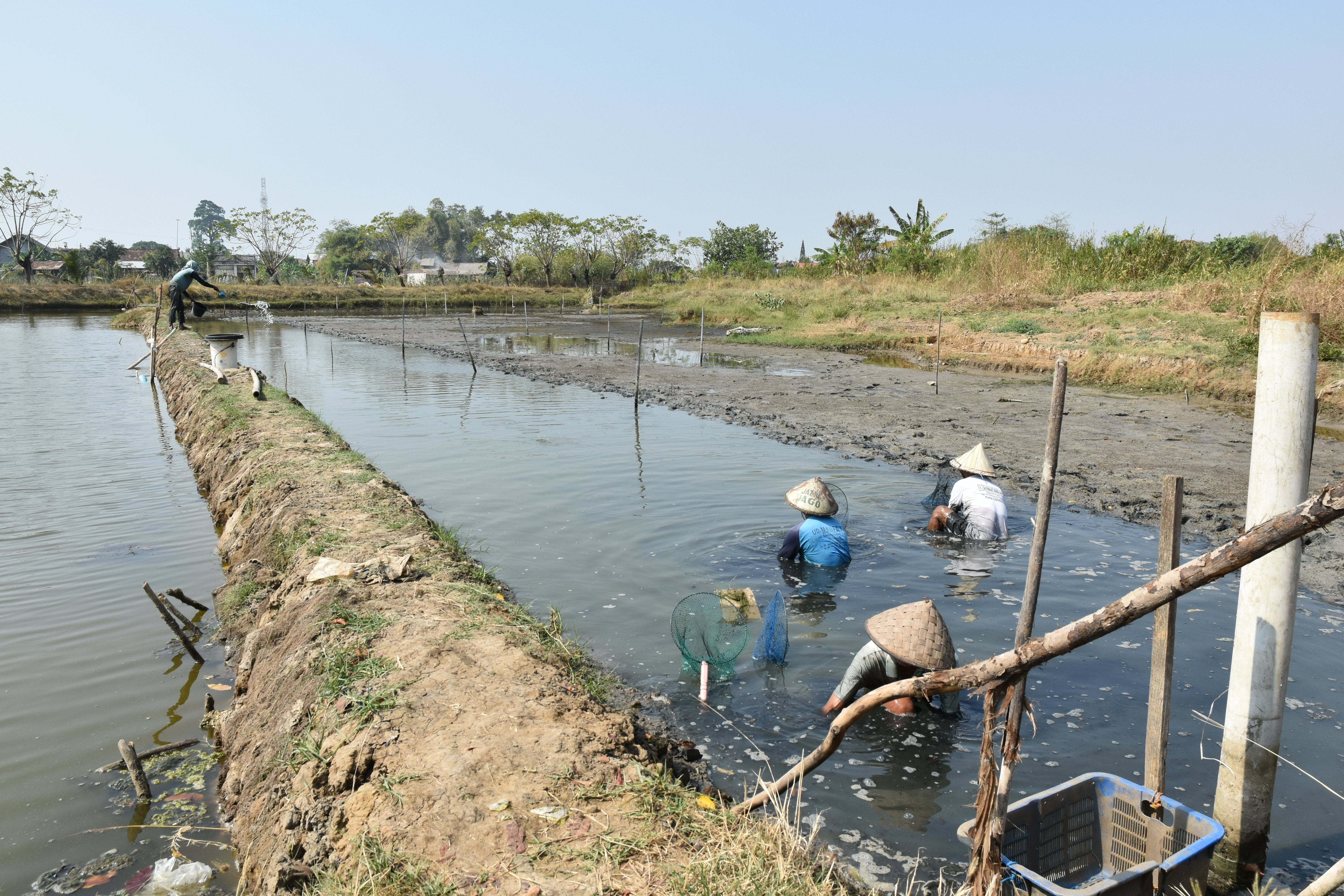 Perikanan air payau masih menjadi salah satu tumpuan ekonomi di Kota Juwana